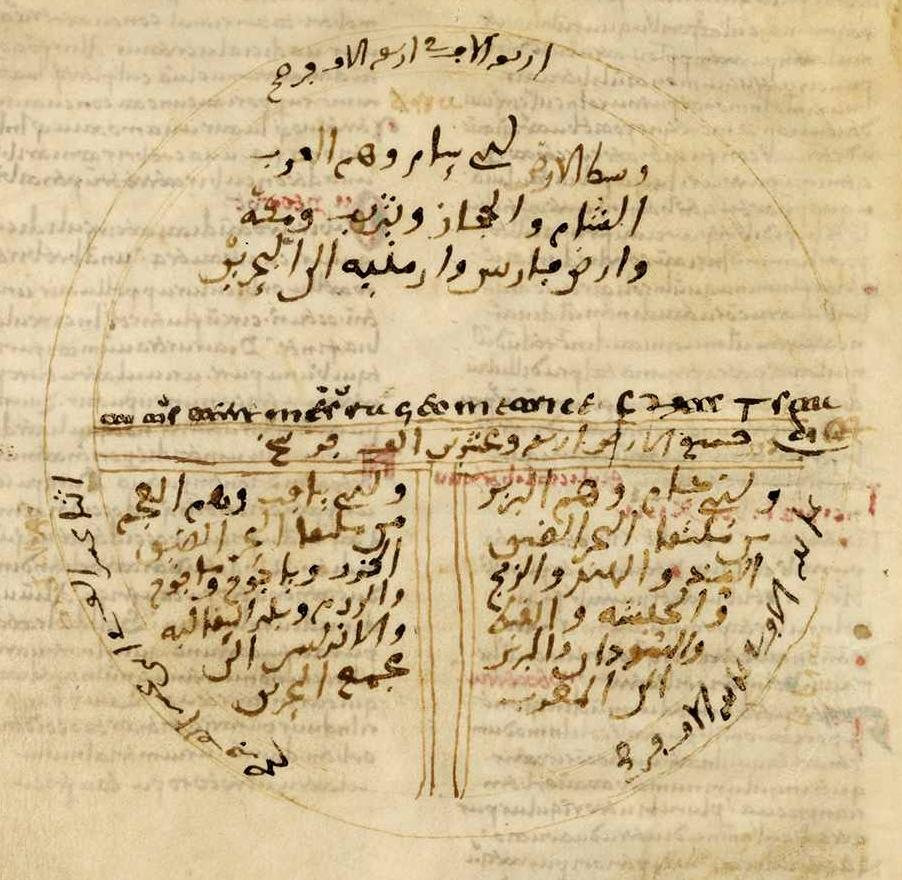 Mapa de T en O con escritura árabe del folio 116v miniado del códice Isidori Etymologiae Codex Toletanus (nunc Matritensis) BNE Vitr. 14-3. Escritura minúscula visigótica (escuela toledanosevillana) 163 folios a dos columnas en pergamino, de 50.52 líneas por página. Procedente de la Catedral de Toledo.